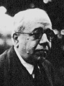 Manuel Azaña, presidente de España (1936 - 1939).